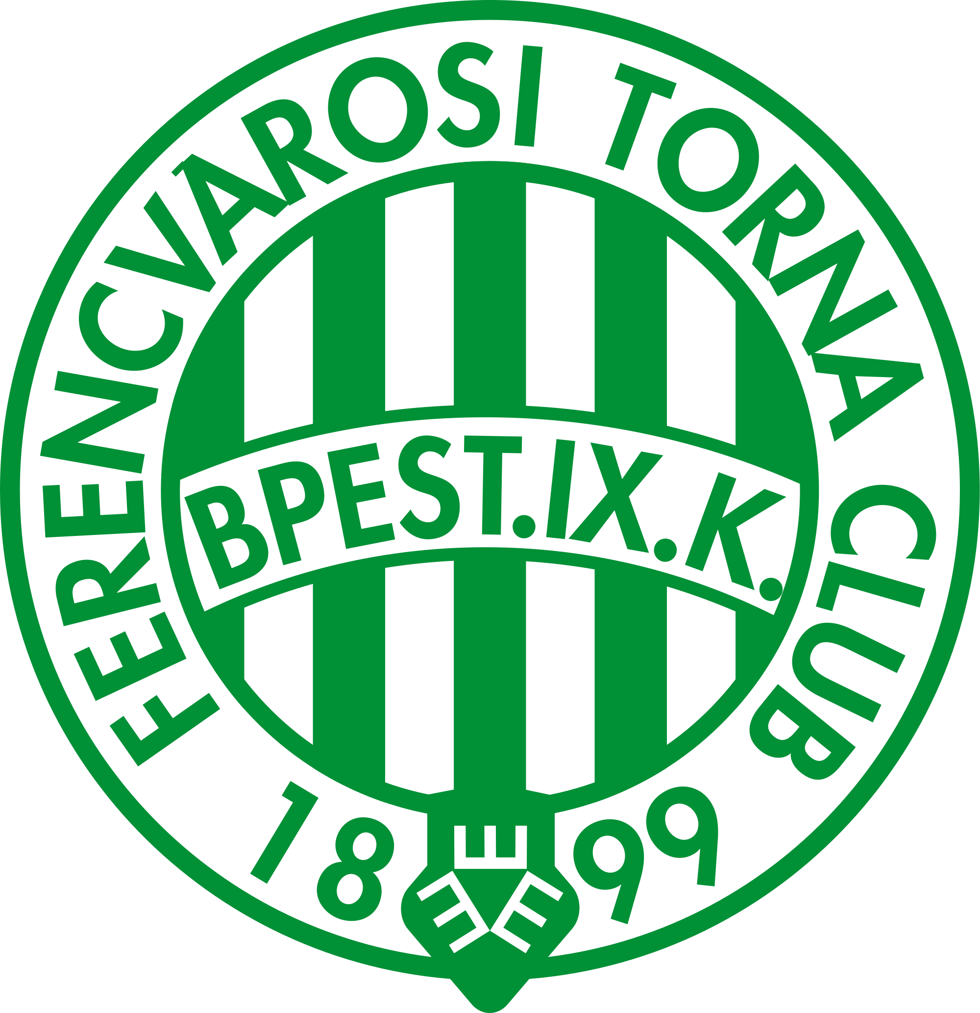 Ferencvaros logotype